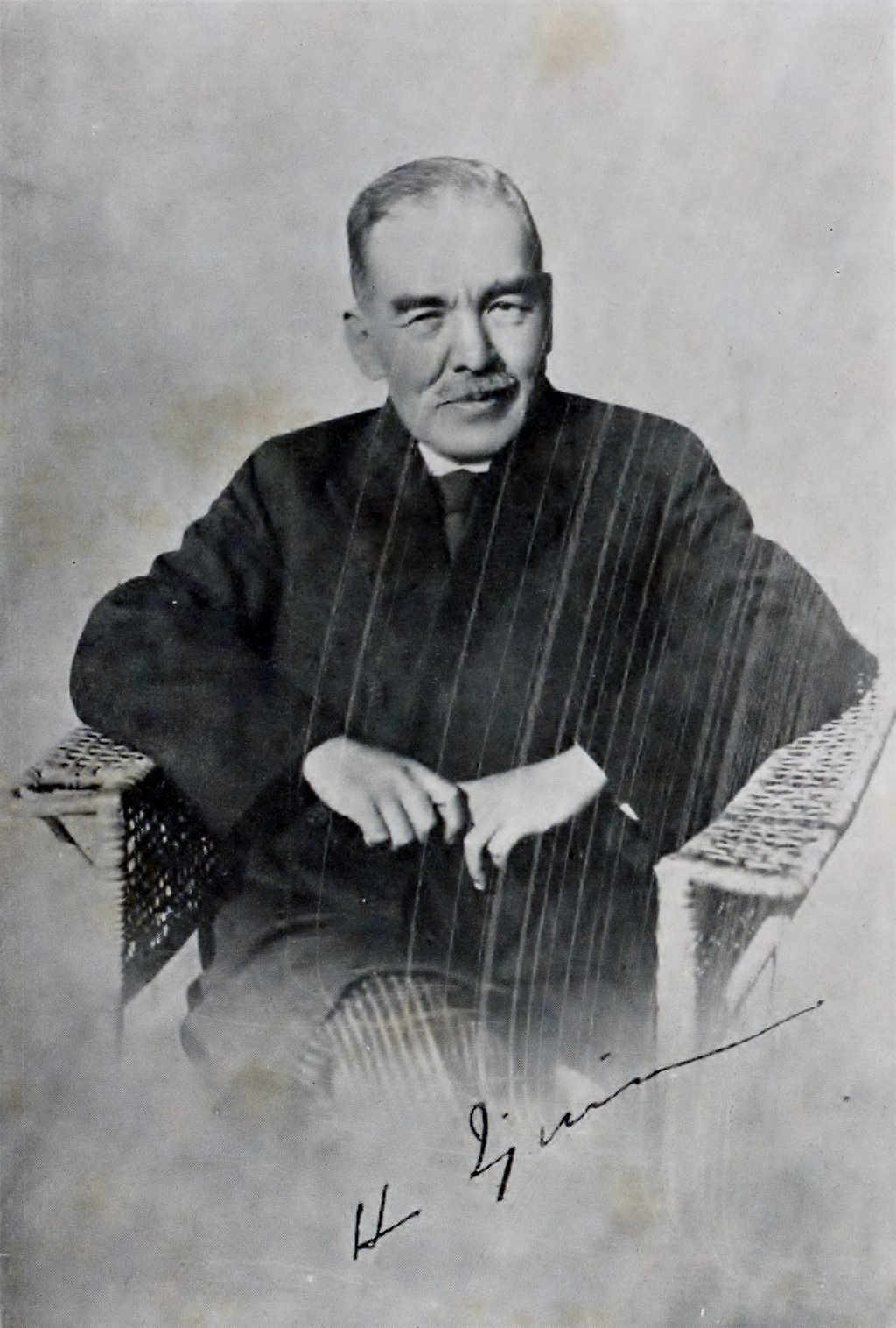 伊集院彦吉の写真。